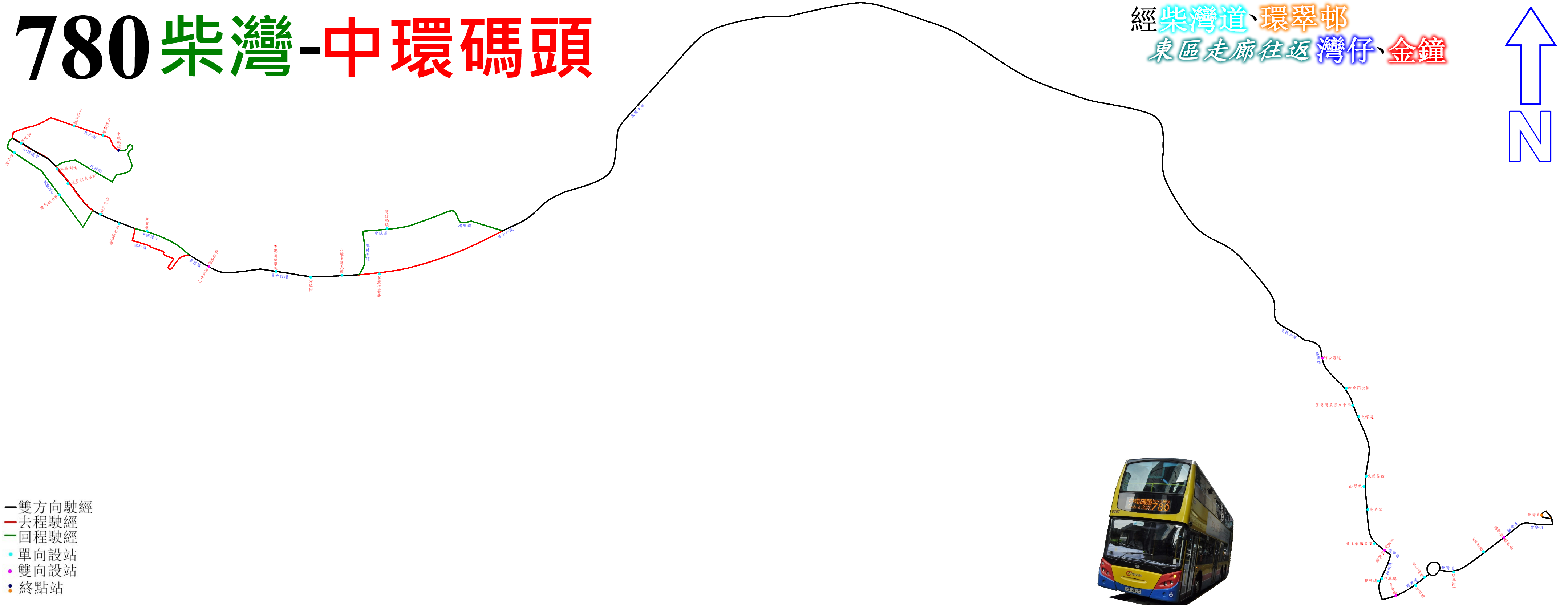 中文（香港）: 城巴780線的走線圖